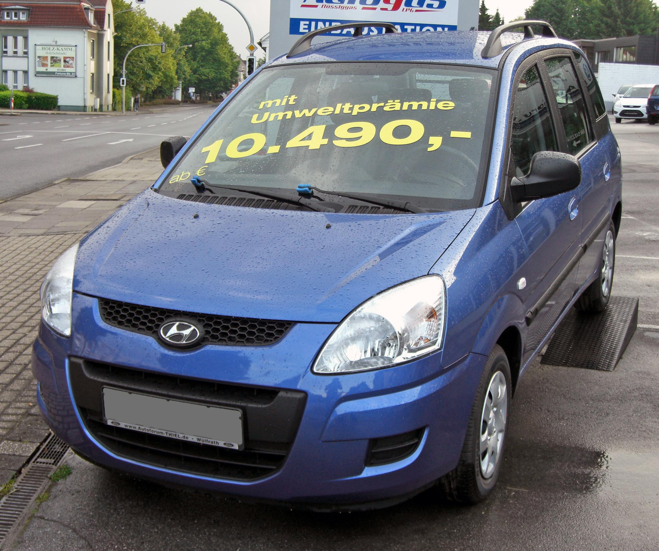 Hyundai Matrix 2. Facelift